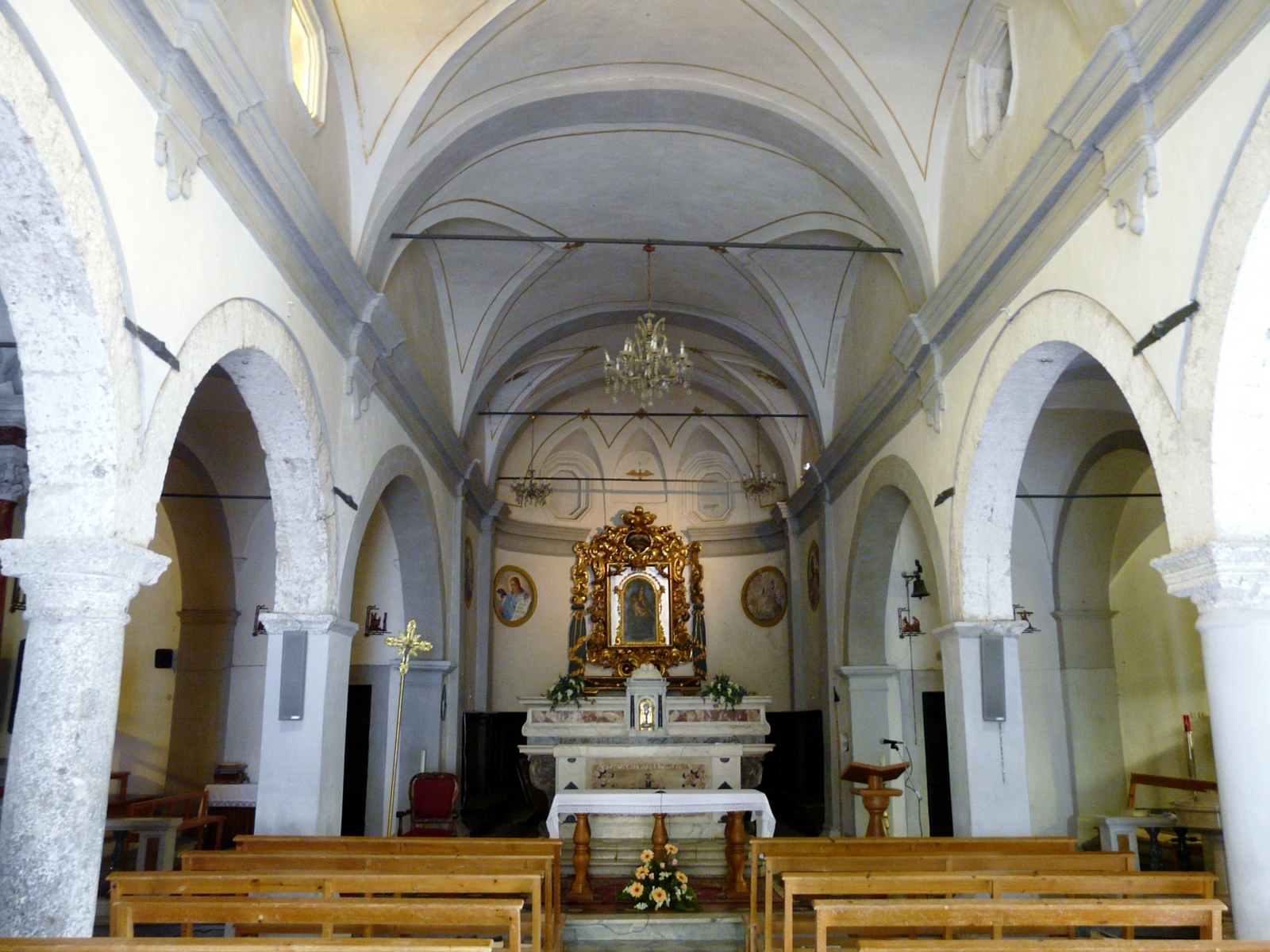 Chiesa dei Santi Quirico e Giulitta, Vergemoli, Toscana, Italia